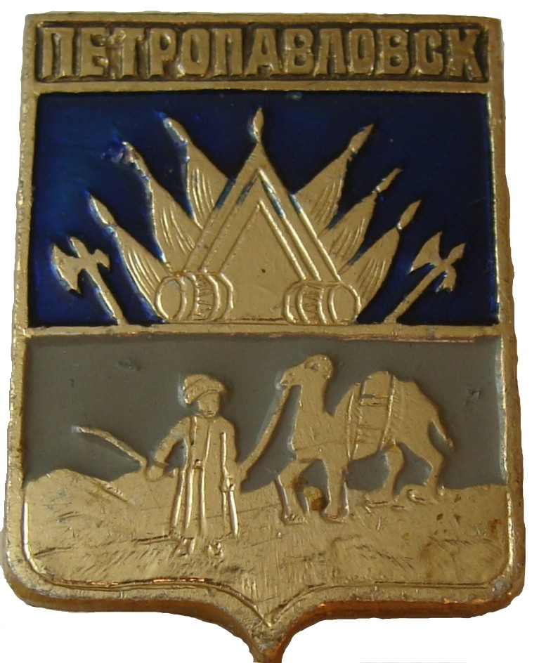 первый герб